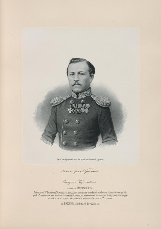 Лейтенант Оскар Карлович Кремер